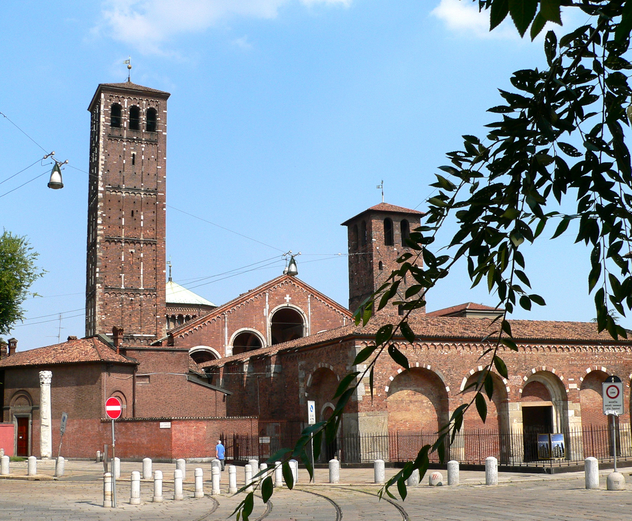 Basílica de San Ambrosio, Milán